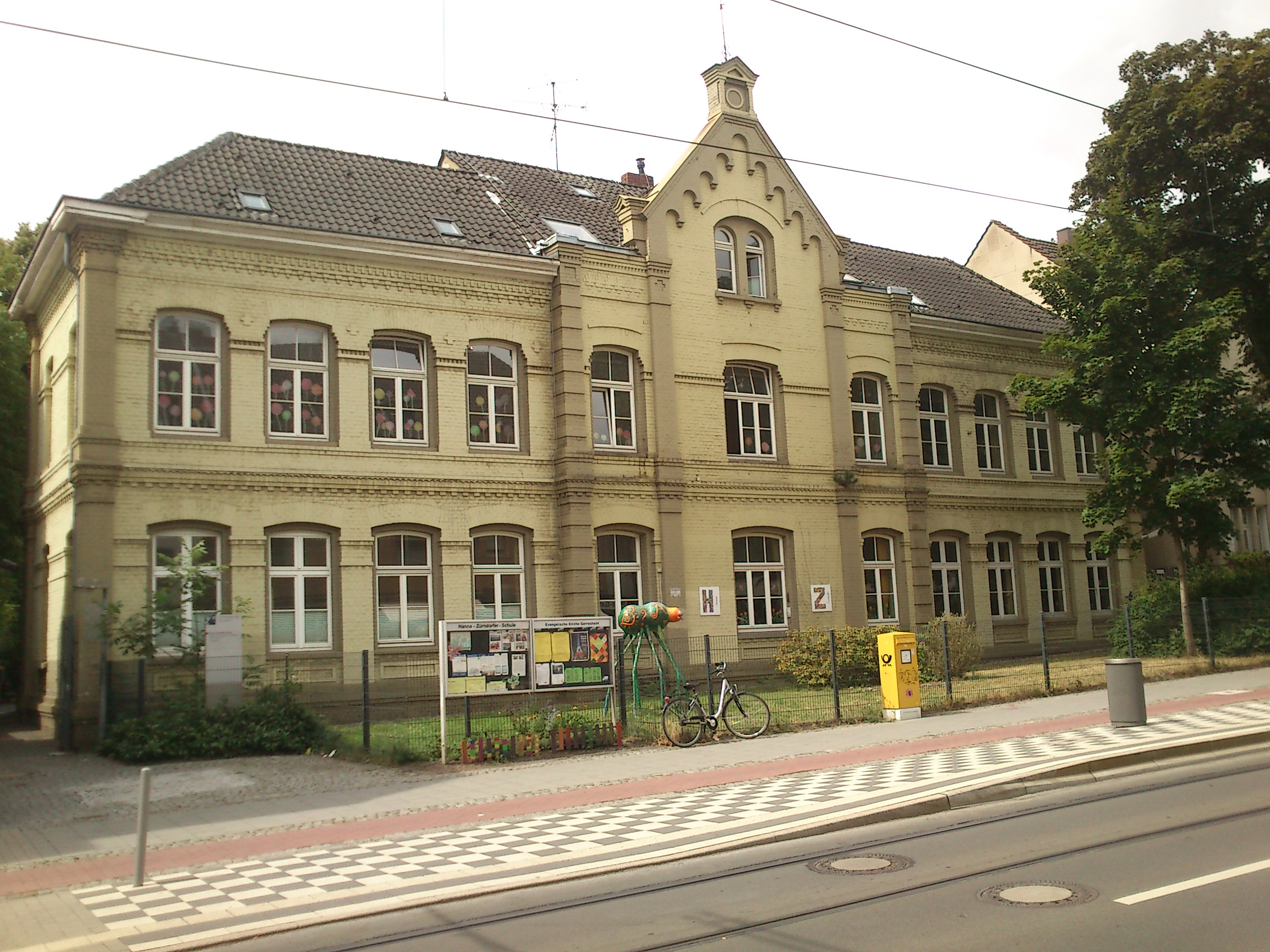 Düsseldorf-Gerresheim-Benderstr. 78-Schule-DNr, 1150This is a photograph of an architectural monument., no. 1150